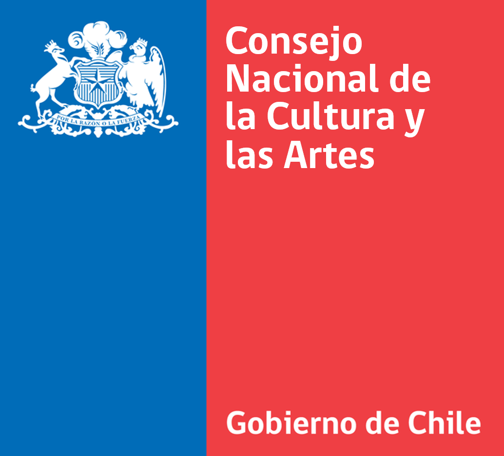 Logo Institucional del Consejo Nacional de la Cultura y las Artes de Chile.